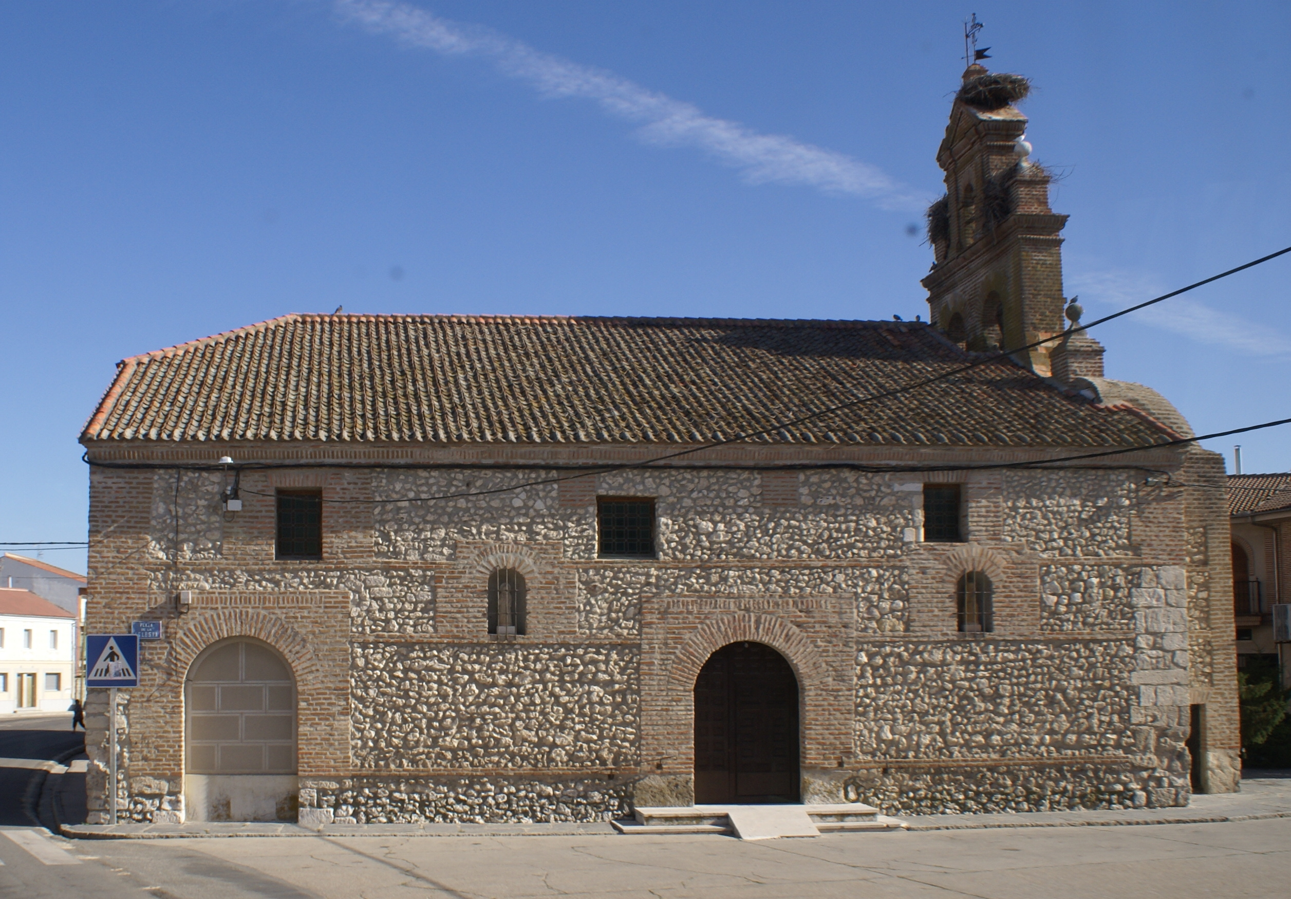 Iglesia de Sanchonuño, Segovia, desde la plaza de la Iglesia.